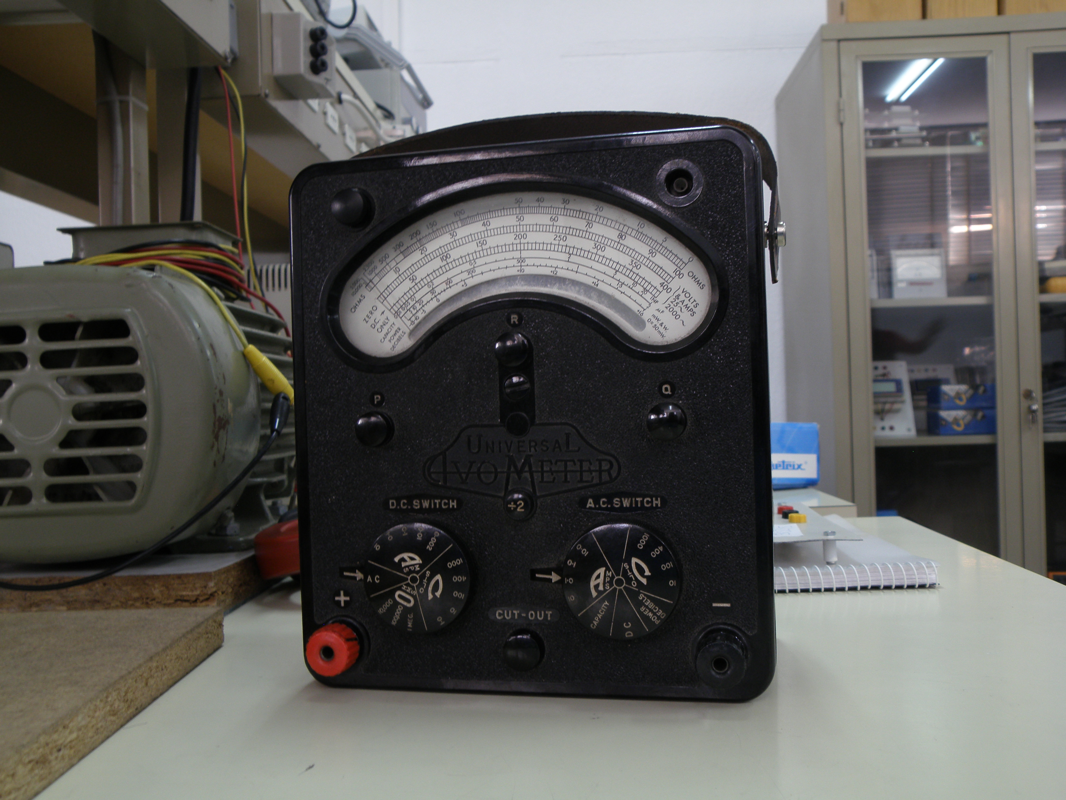 Imagen de un Avometro modelo 7, fabricado en 1965 y adquirido por la ETSIT-UPM en 1966.